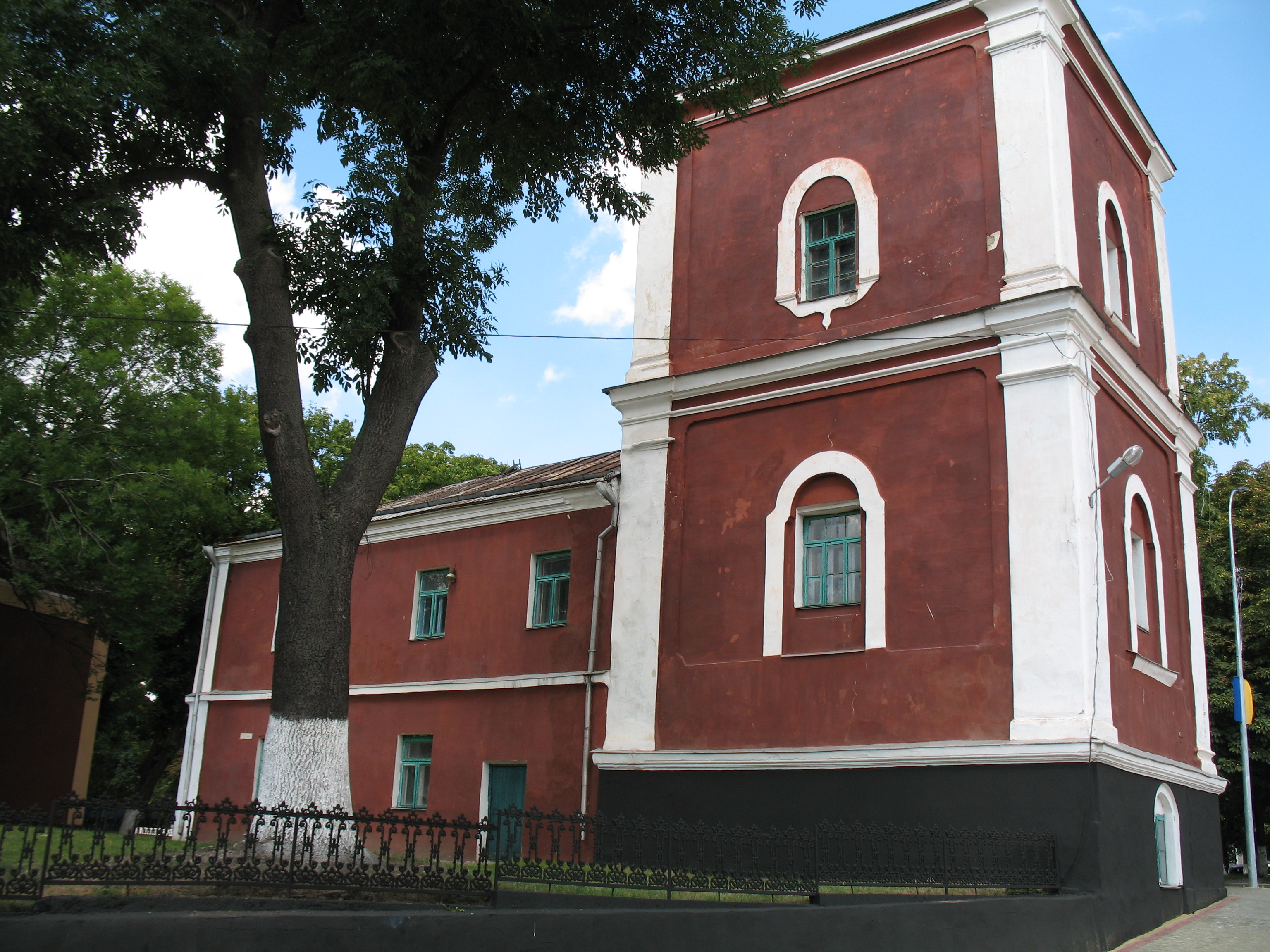 Володимир Волинський. Дзвіниця Домініканського монастиря. Вид з вулиці Собрної